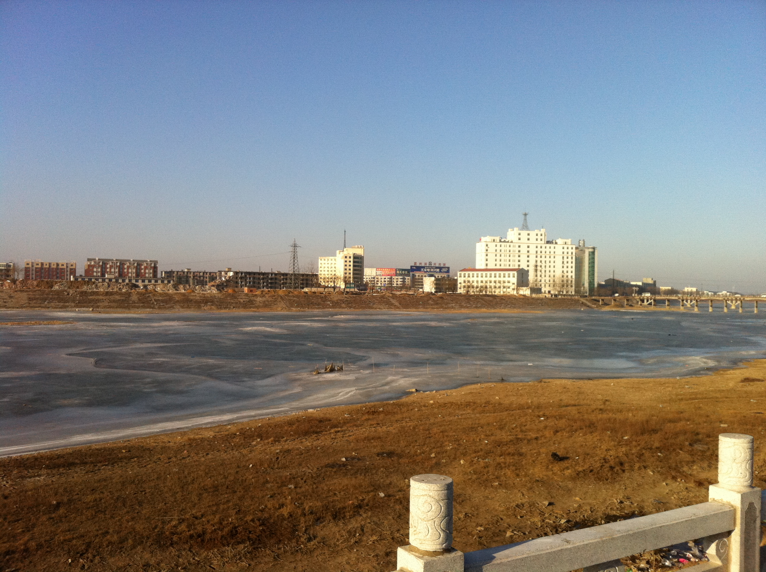 Gaizhou, Yingkou, Liaoning, China